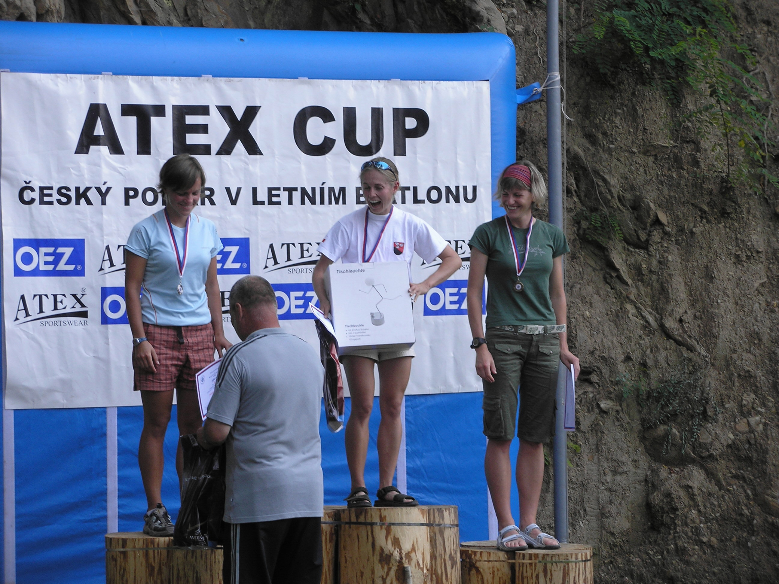 Medailistky z MR v letním biatlonu